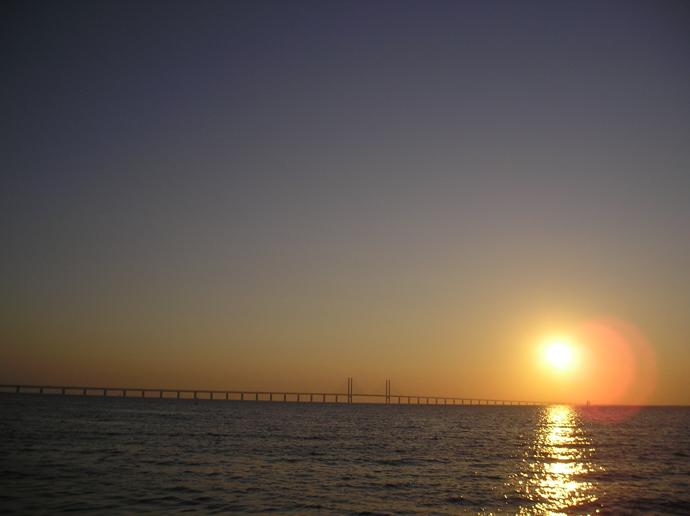 Öresundsbron at sunset, view from Malmö.